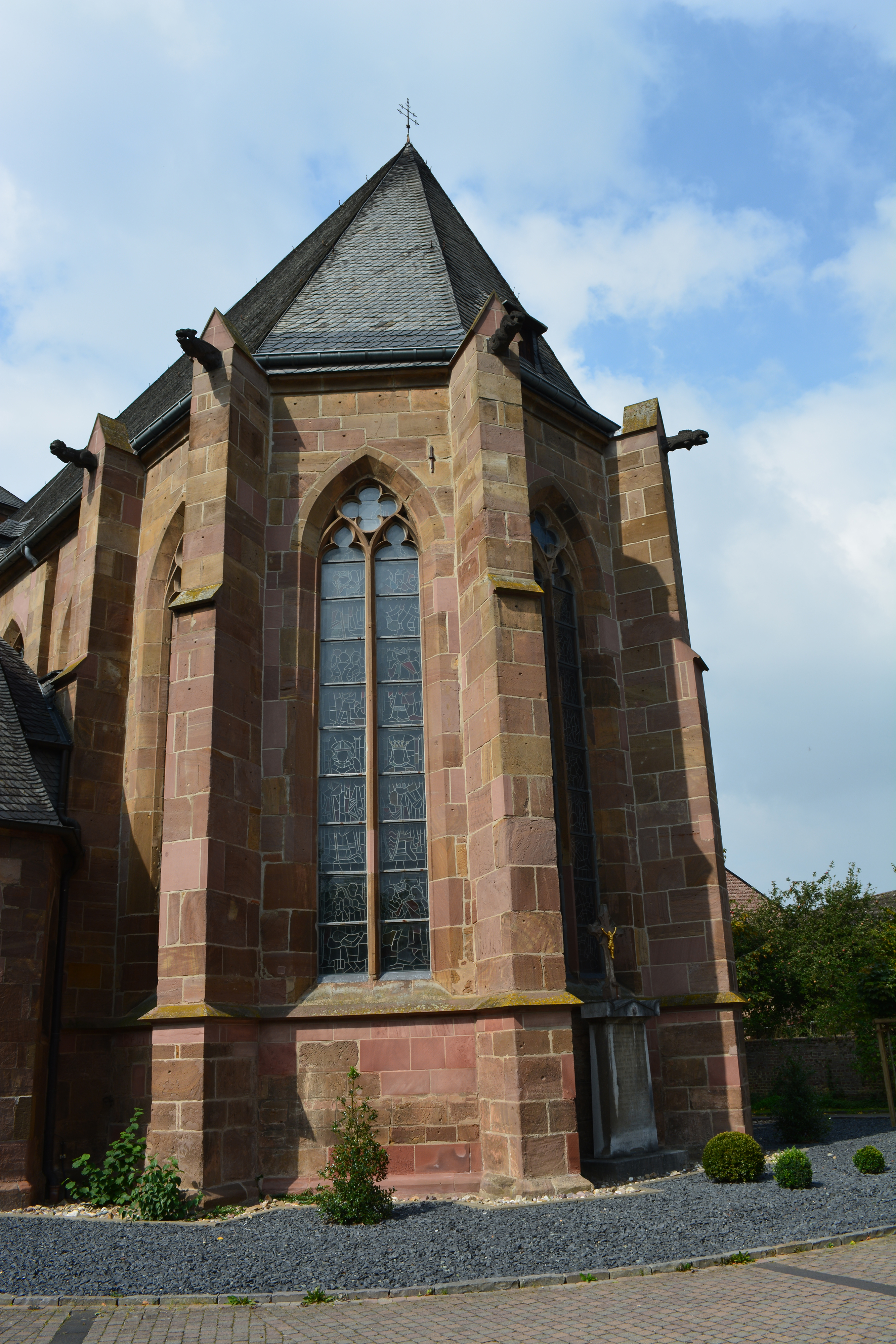 St. Heribert, Kreuzau This is a photograph of an architectural monument.